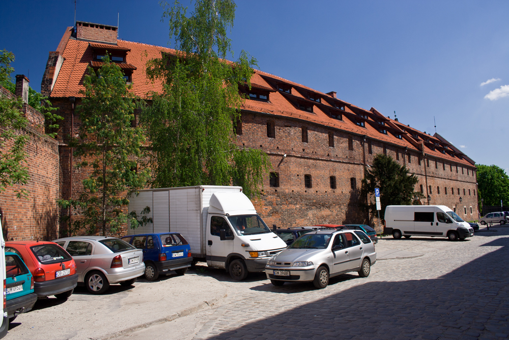 Południowe skrzydło Arsenału Mikołajskiego od ul. Cieszyńskiego